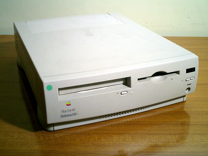 El «Macintosh Performa 630» és la versió per l'usuari final del Quadra 630. La versió educativa va ser el LC 630.